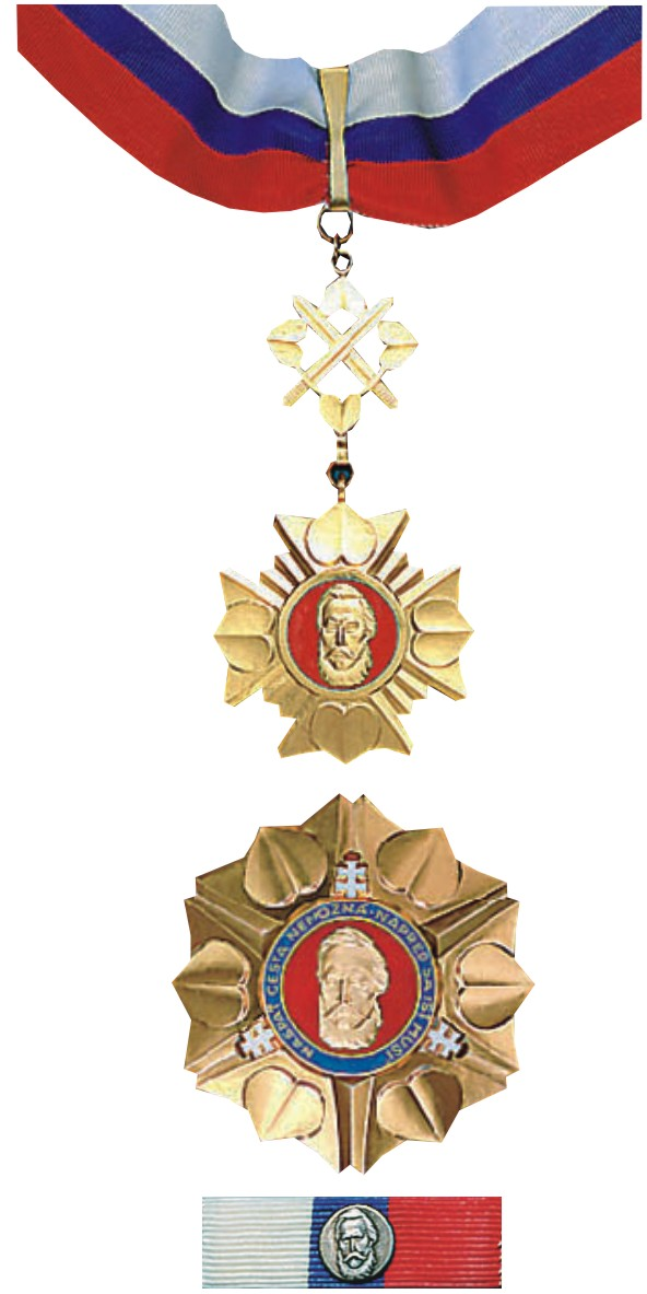 Rad Ľudovíta Štúra 2. triedy vojenského druhu. Insígnie vojenského druhu II. triedy radu tvorí: radový kríž s náhrdelníkovou stuhou, radová hviezda, radová stužka a radová rozeta. Radový kríž má priemer 60 mm, je razený zo striebra, pozlátený. Náhrdelníková stuha je hodvábna, bielo-modro-červená, s pomerom farieb 3/8:2/8:3/8, dlhá 50 cm, široká 38 mm. Radová hviezda má priemer 75 mm, heraldicky je stvárnená rovnako ako radová hviezda I. triedy. Radová stužka je hodvábna, bielo-modro-červená, s rovnakým pomerom farieb, dlhá 18 mm, široká 10 mm. V strede radovej stužky je zo striebra razený medailón s plastickým portrétom Ľudovíta Štúra s priemerom 10 mm.